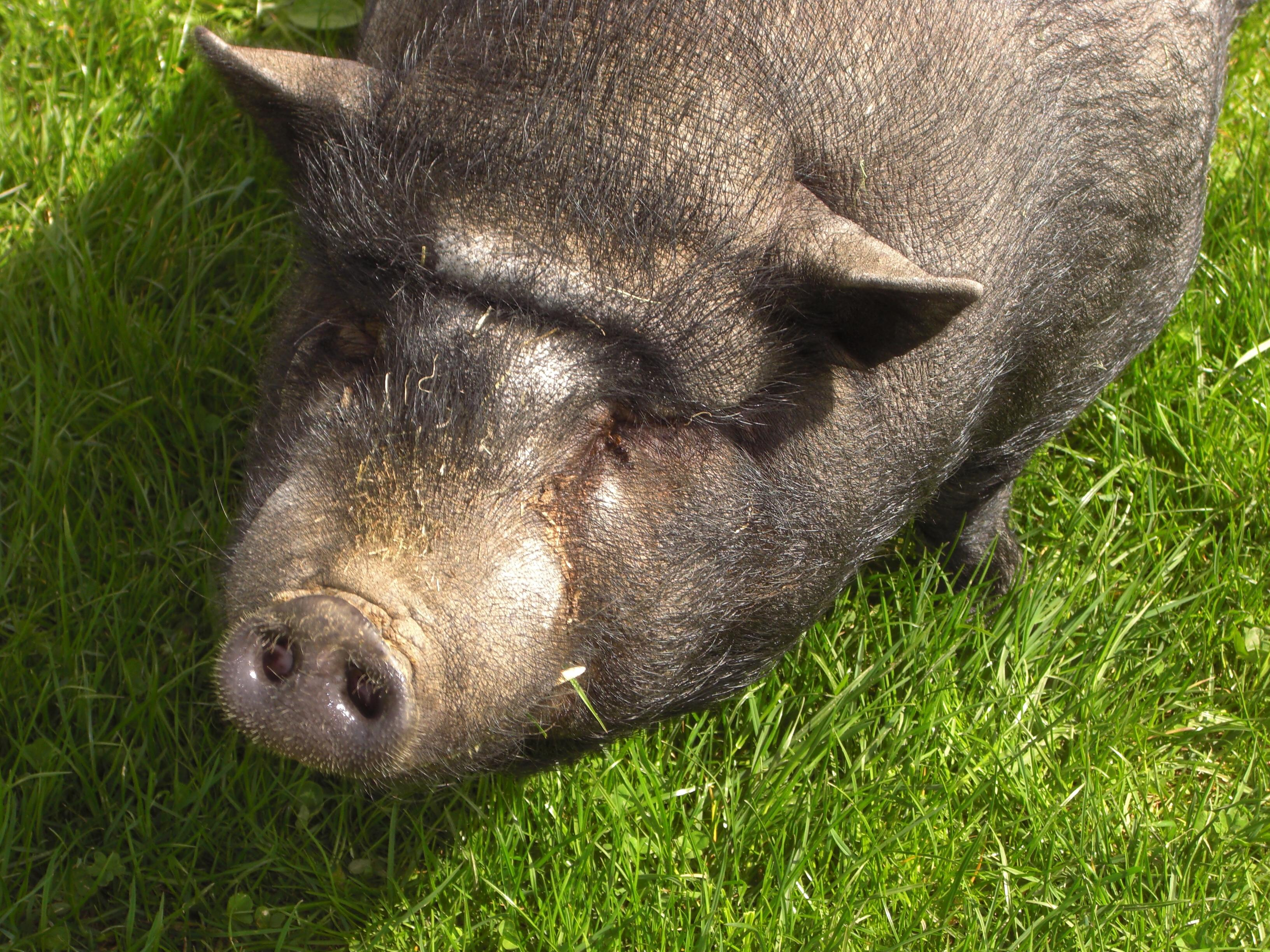 Sputnik - ein Göttinger Minischwein